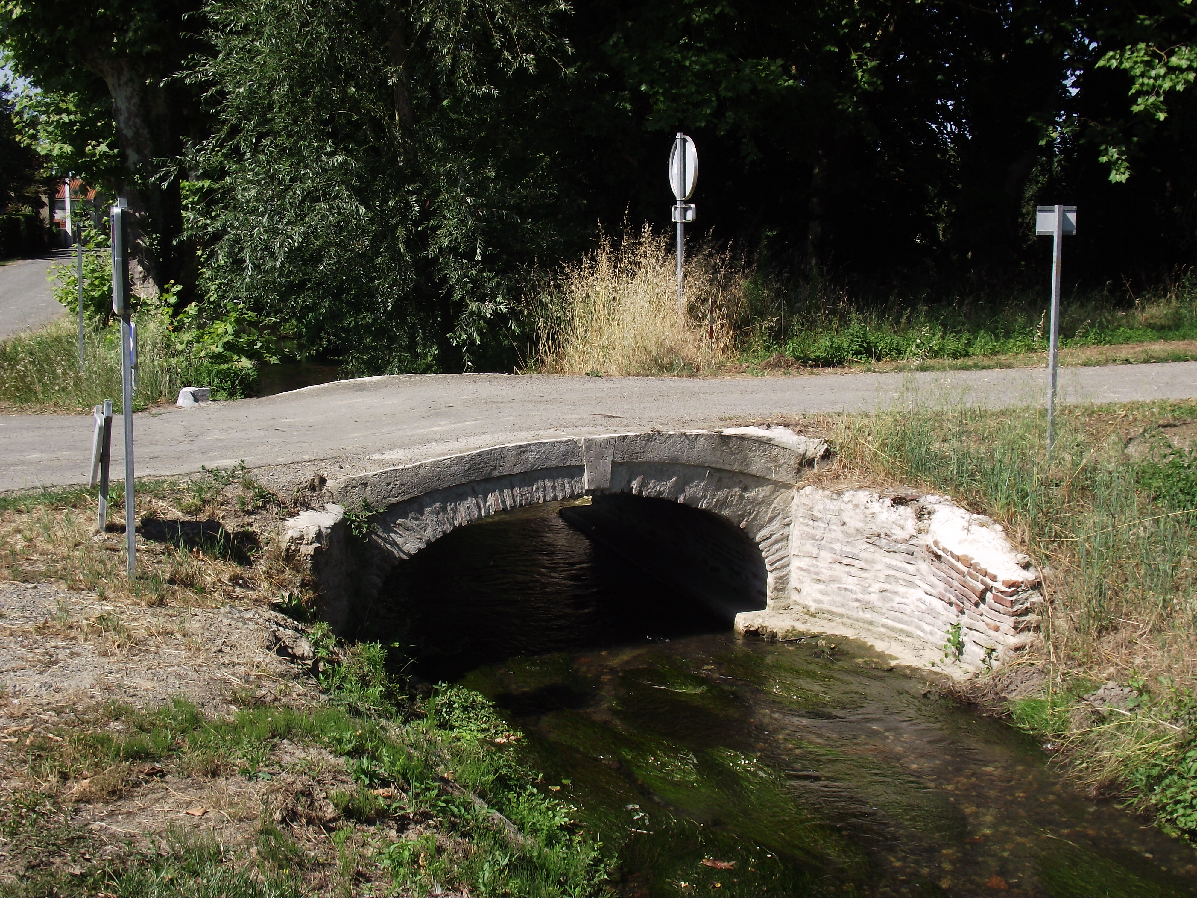 Petit pont sur l'Aule à Sarriac-Bigorre